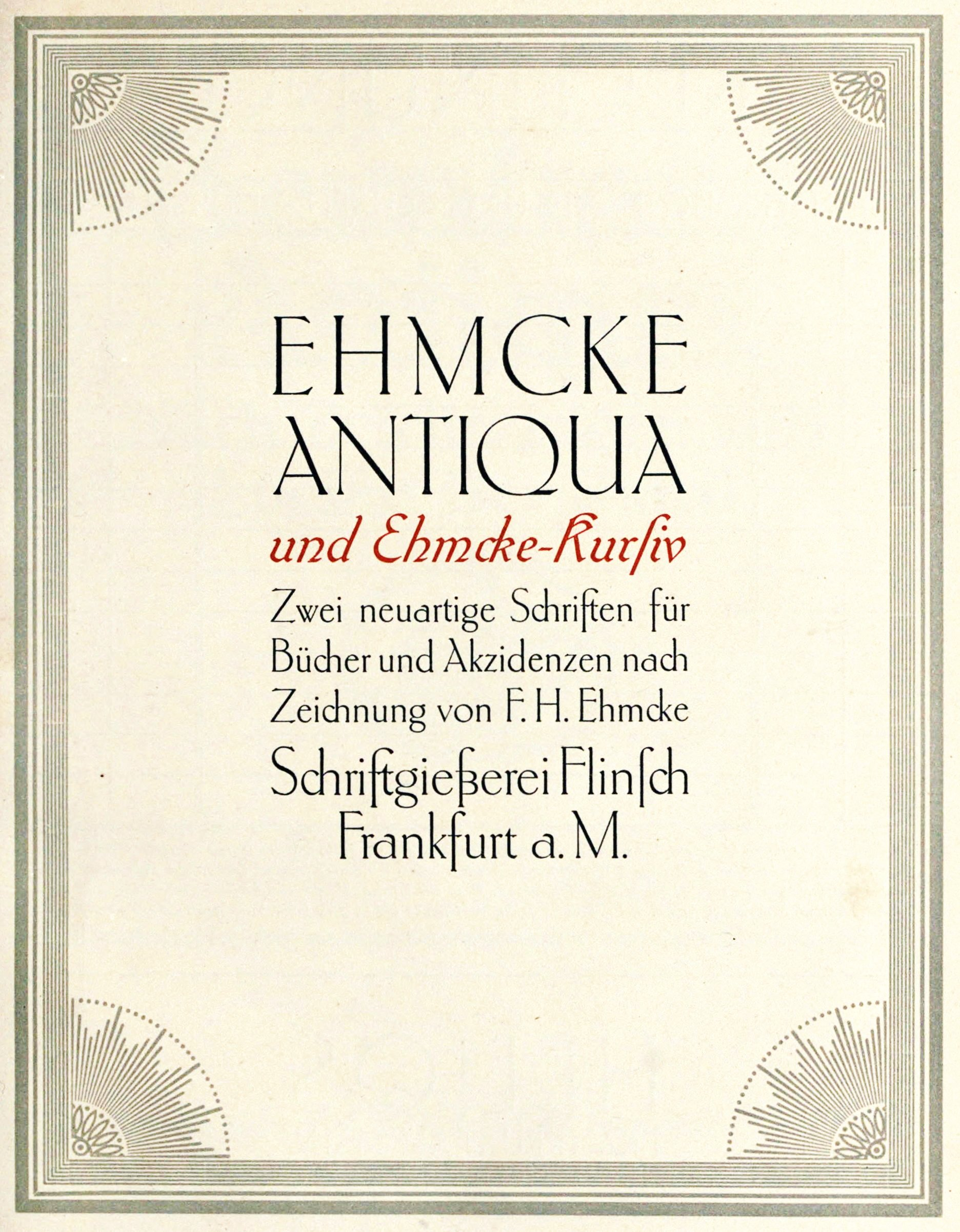 Jahrbücher des Deutschen Werkbunds